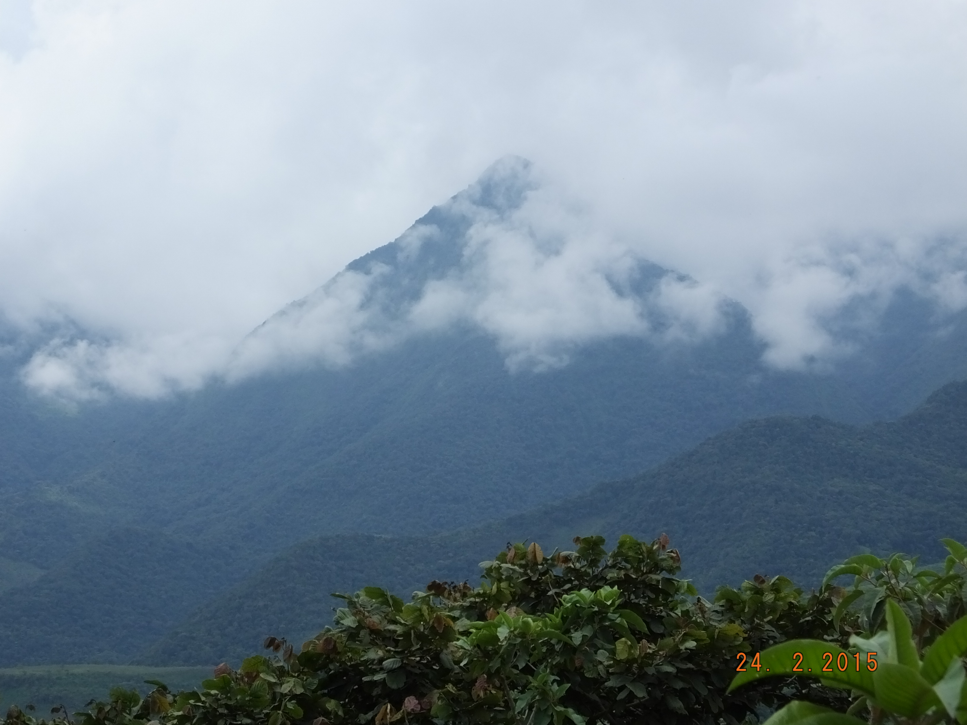 Este cerro de ubica en el distrito de Ayabaca, sin embargo debido a su altitud puede ser visualizado desde cientos de kilómetros. Cuenta la leyenda que este cerro en determinadas épocas del año peleaba con el cerro de Chacas, que se encuentra frente a éste.